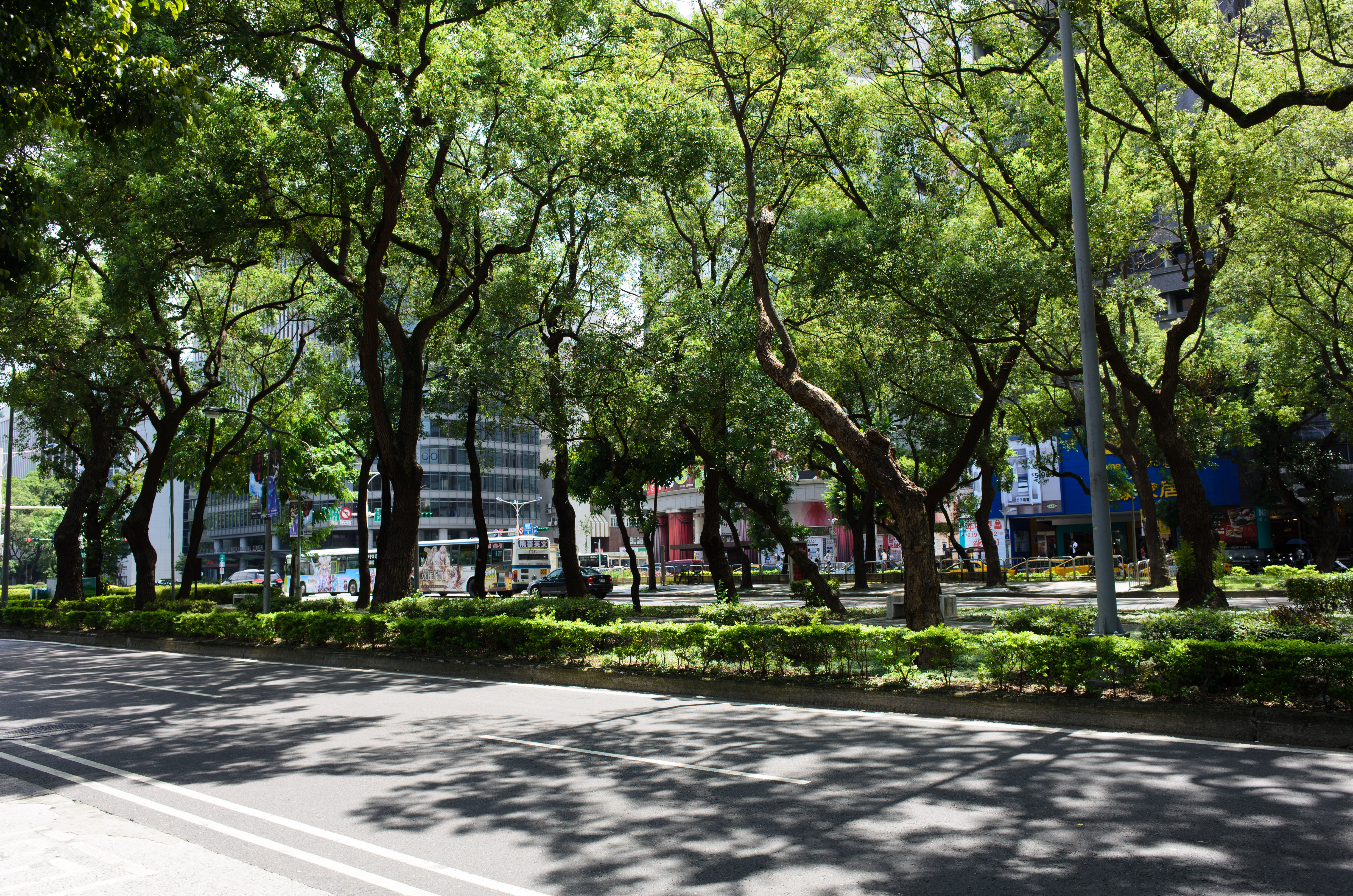 中文（台灣）: 臺北市松山區敦化北路與南京東路四段路口北側，夏日西望敦化北路安全島樟樹林蔭。